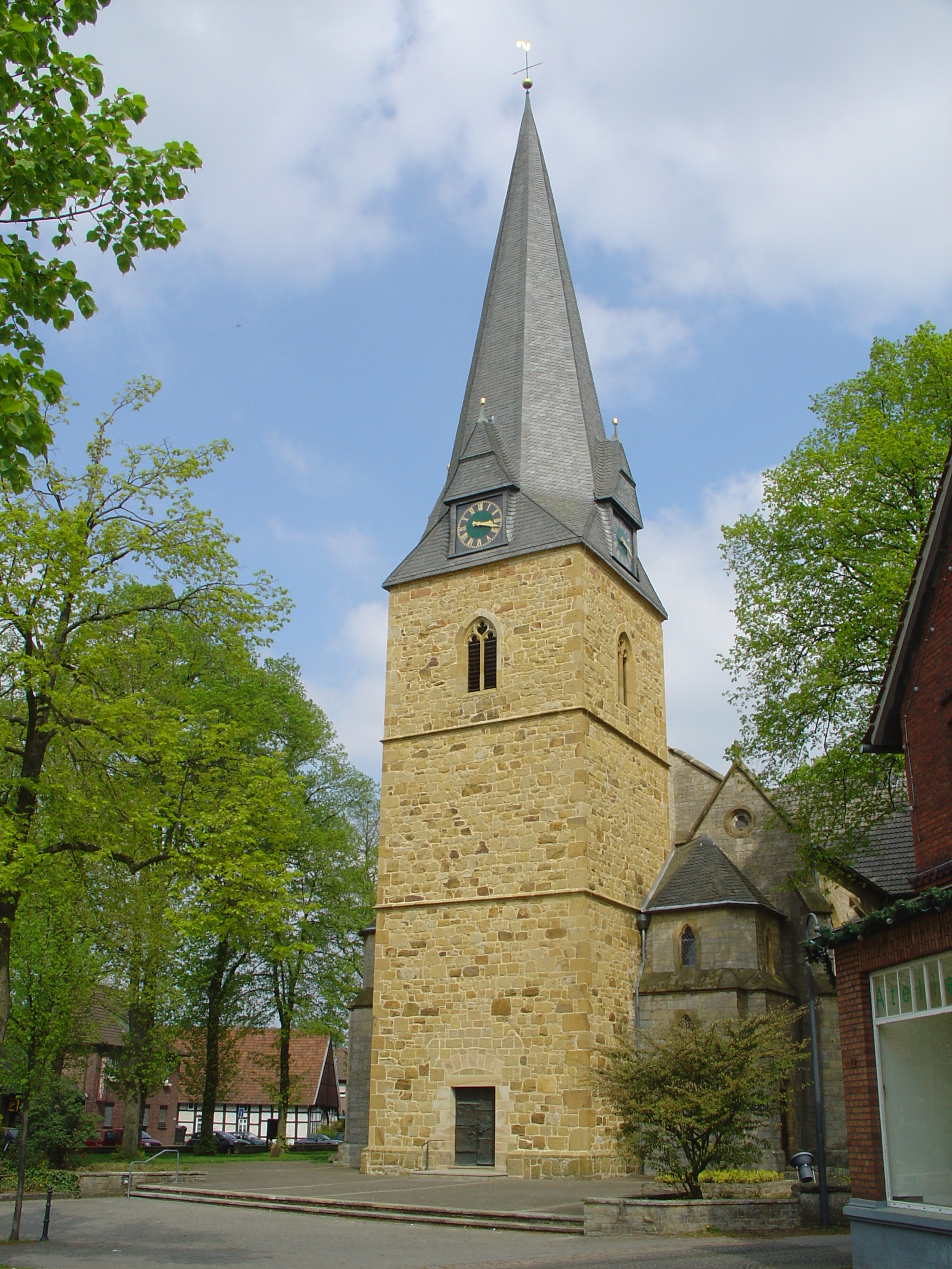 Kirchturm der evangelischen Kirche Isselhorst This is a photograph of an architectural monument. 068